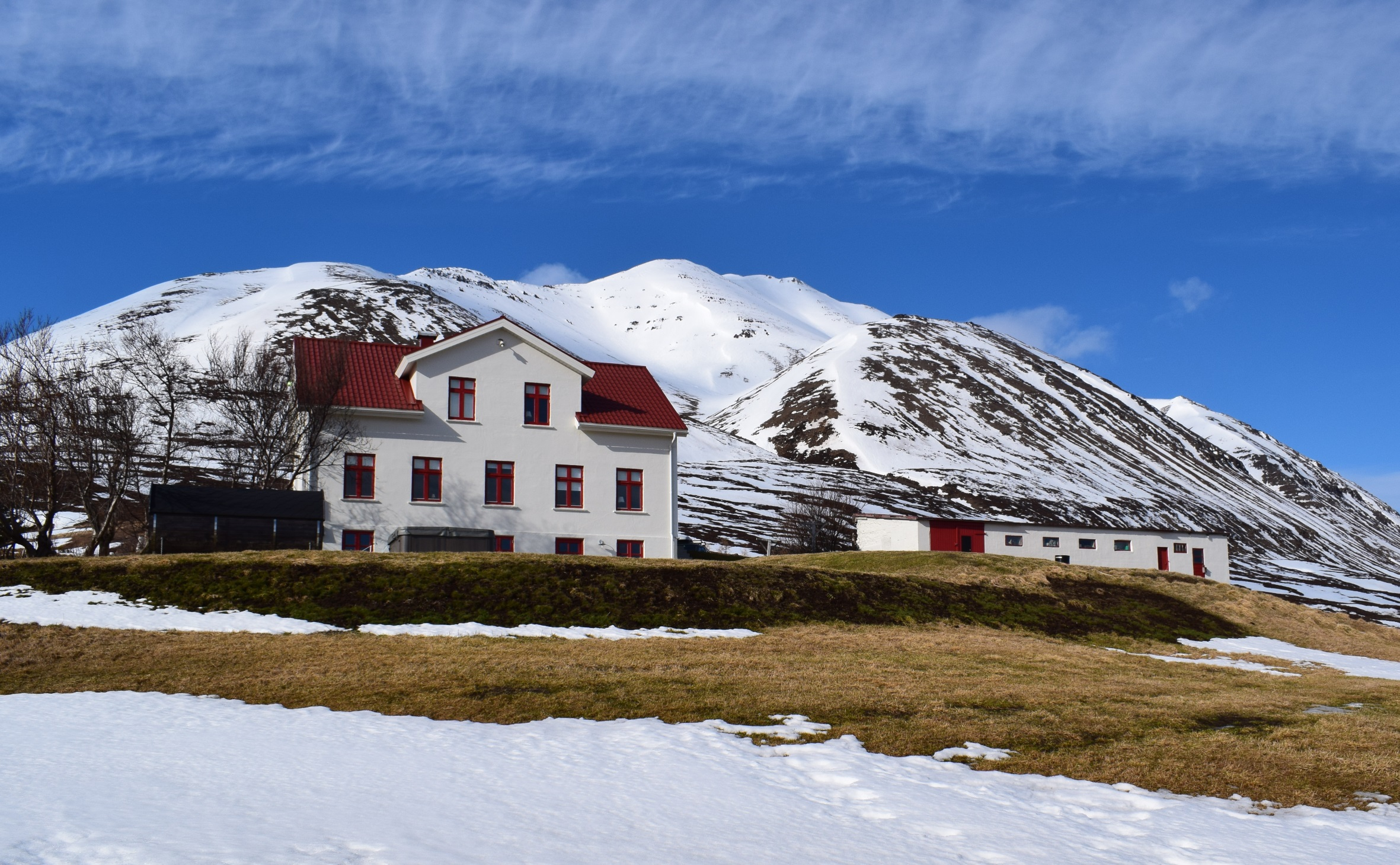 Karlsá á Upsaströnd utan Dalvíkur